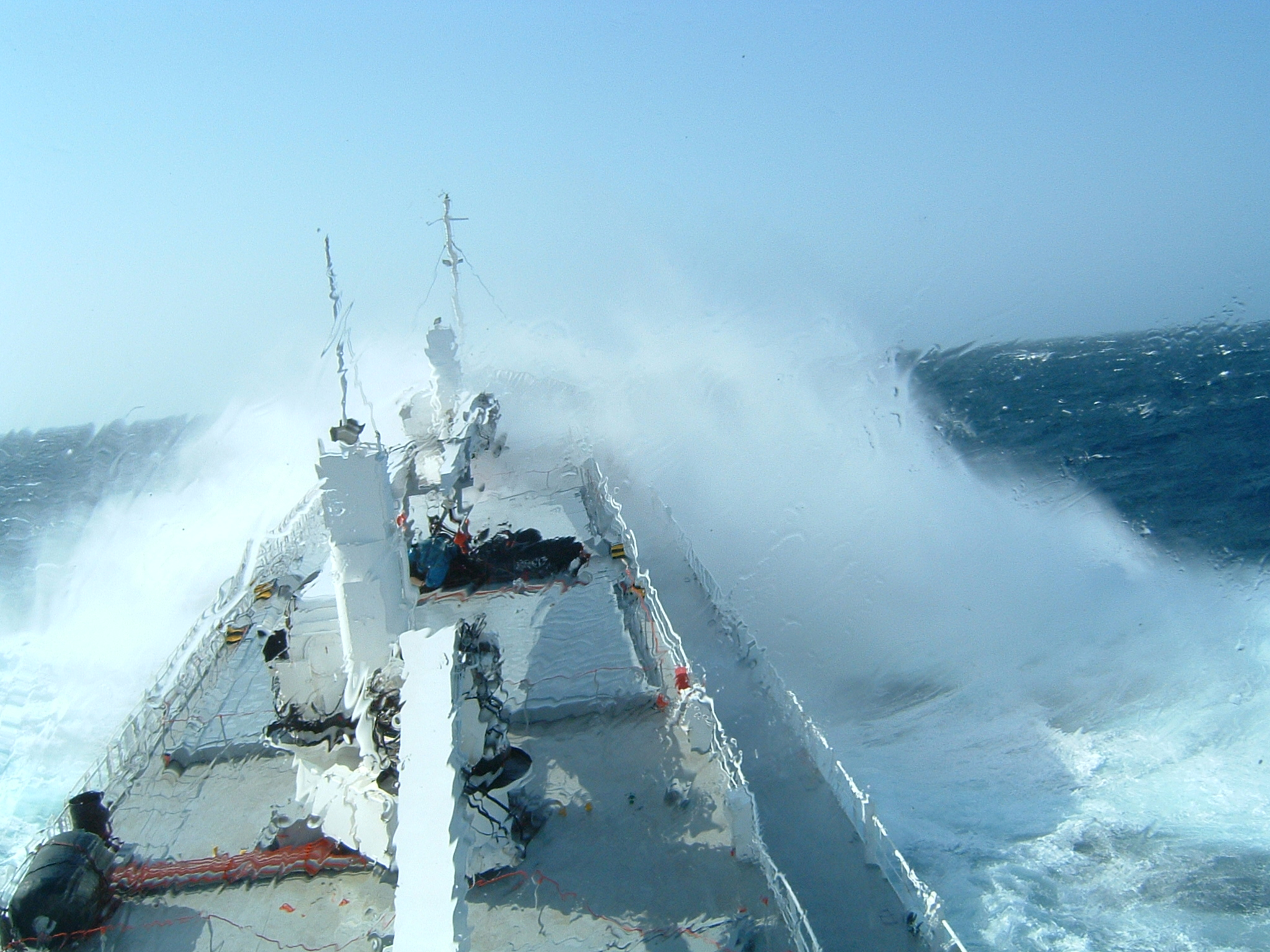 Cargo vessel during bad weather - Navire de commerce dans le mauvais temps.